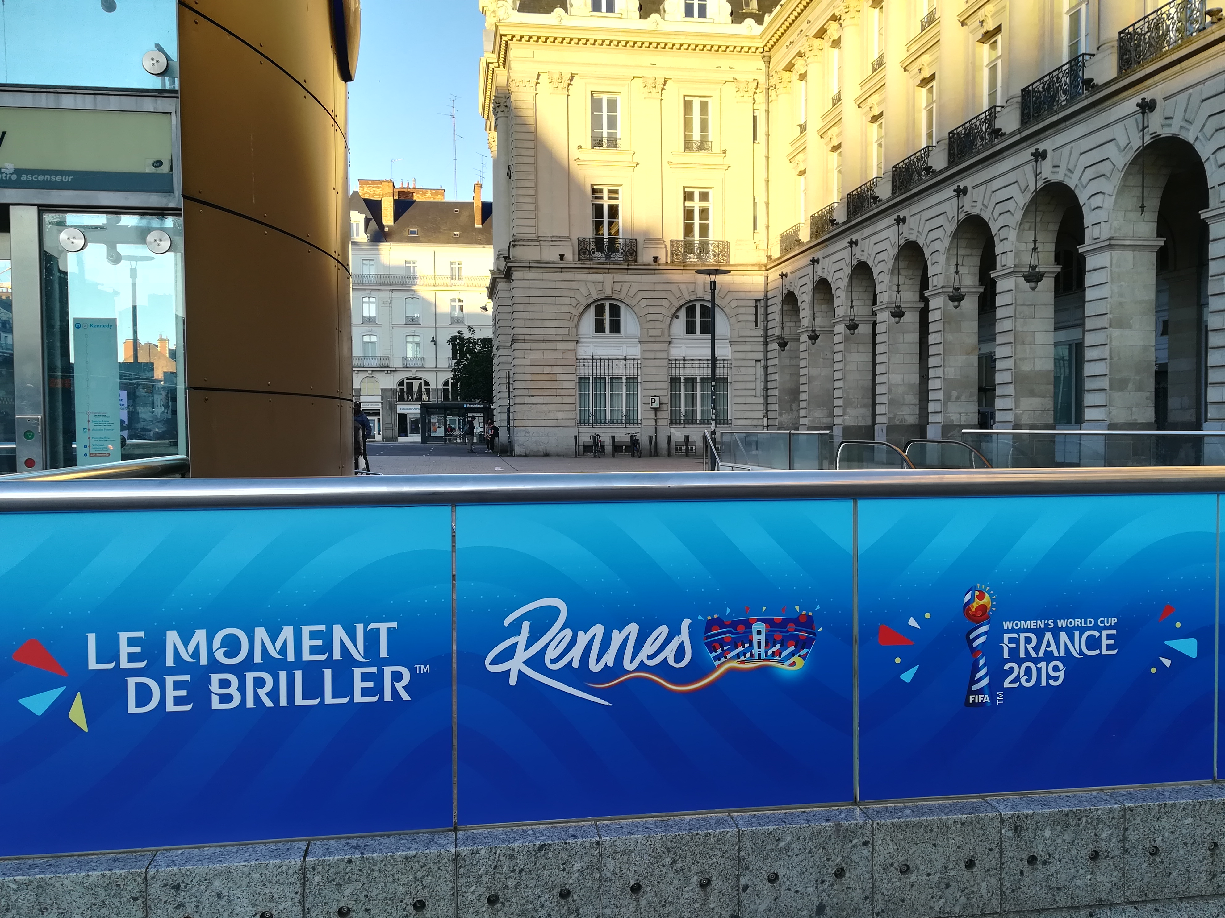 Station République durant la Coupe du monde féminine de football 2019.